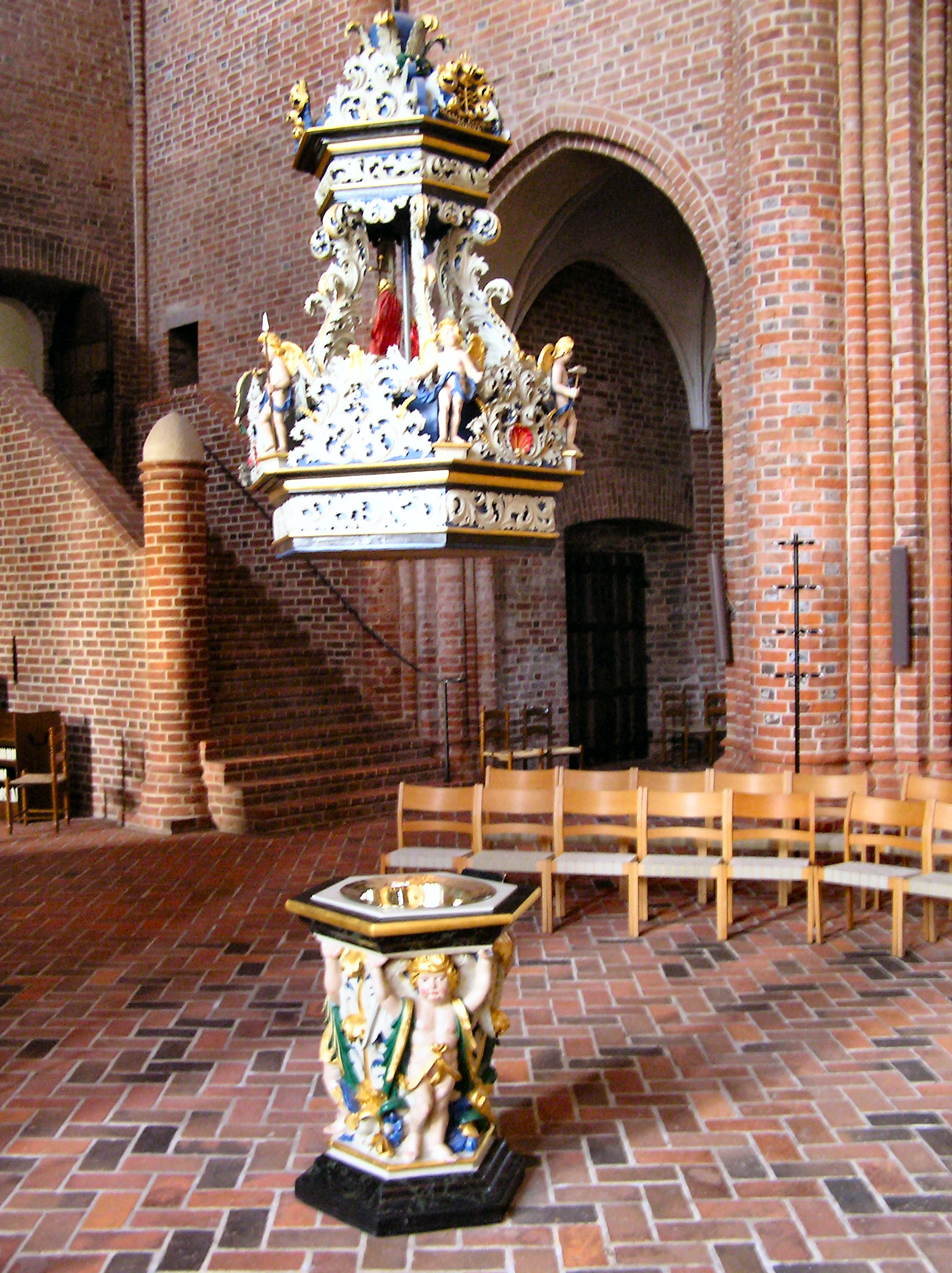 Løgumkloster Kirke, Døbefont